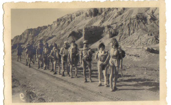 מסע רגלי של הנוער העובד מסדום למצדה